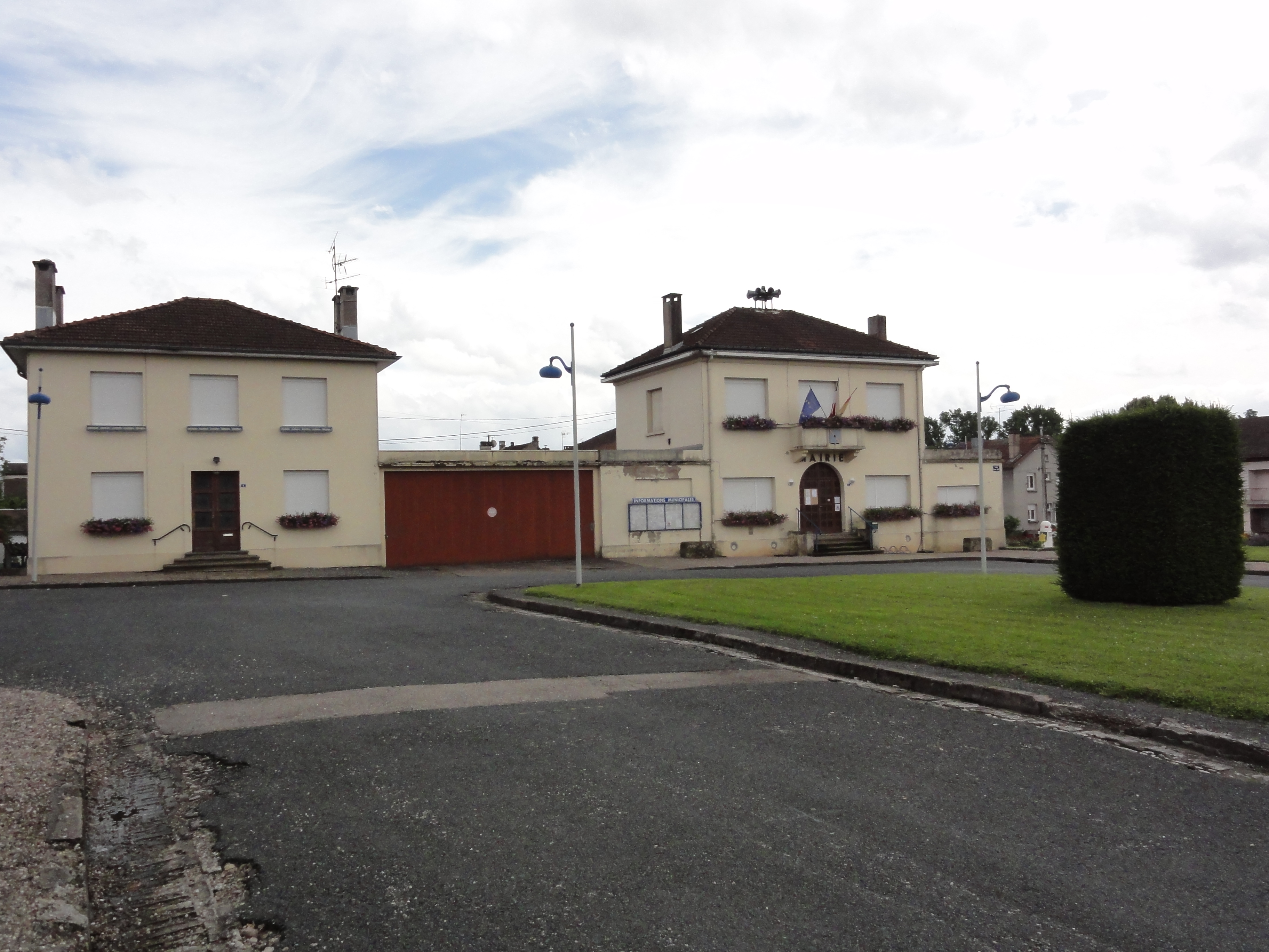 Azerailles (M-et-M) mairie